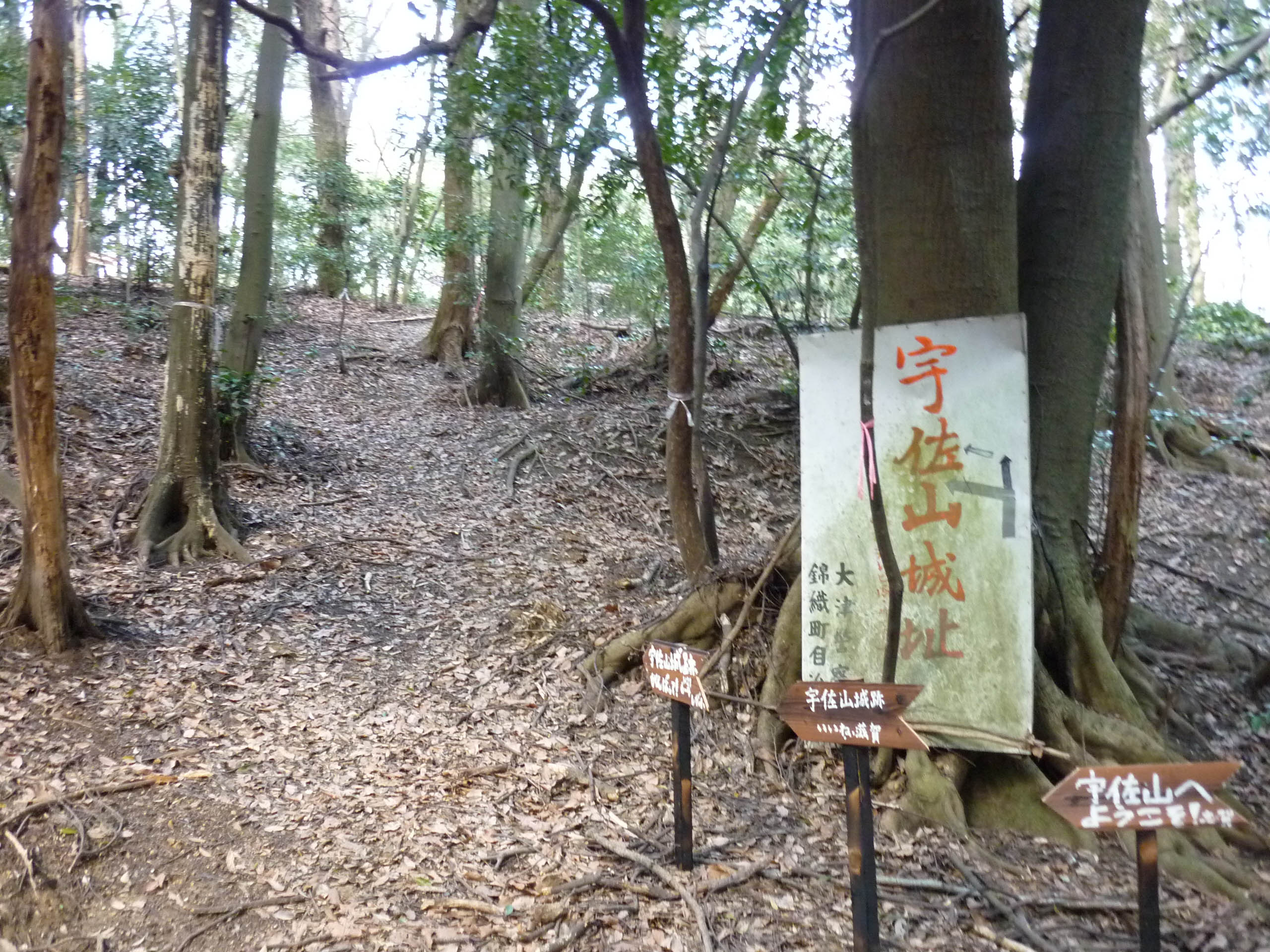 宇佐山城の入り口